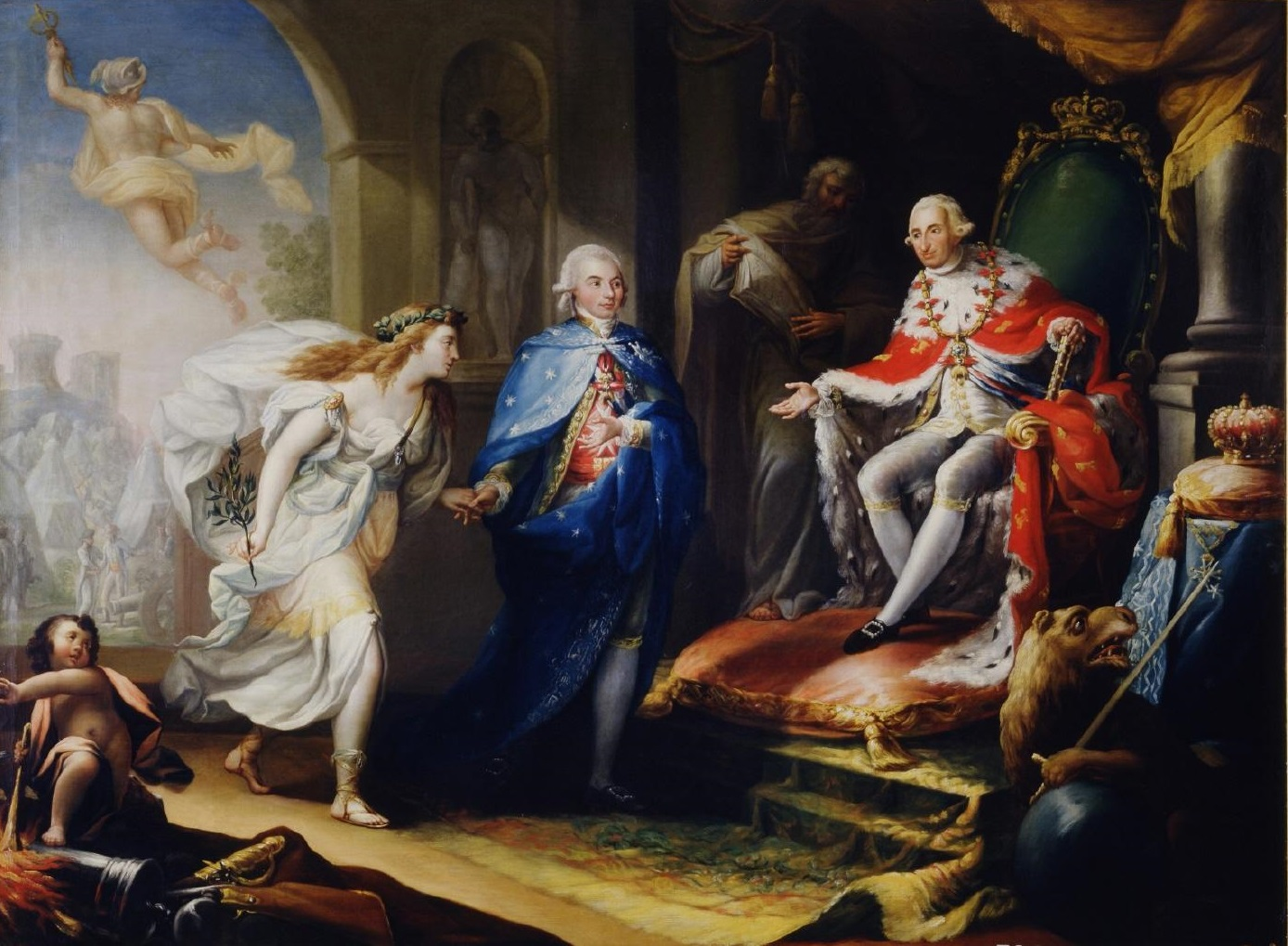 El lienzo, con el que su autor obtuvo el primer premio en el concurso de la 1ª clase de la Real Academia de Bellas Artes de San Fernando en el año 1796, muestra a Manuel de Godoy, valido del rey Carlos IV de España, como artífice de la paz firmada entre España y Francia en el tratado de Basilea, que fue suscrito por ambos reinos en 1795. Godoy aparece luciendo la venera de la Orden del Toisón de Oro y el manto de la Orden de Carlos III, y presenta la Paz, en forma de rama de olivo, al rey Carlos IV, y a la izquierda el dios pagano Mercurio, que representa al diplomático Domingo de Iriarte, anuncia la paz a los ejércitos españoles y franceses.